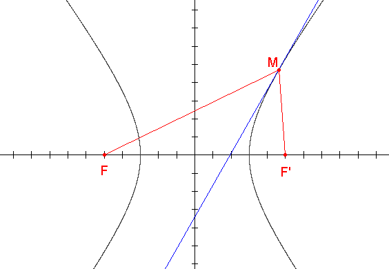 Définition bifocale de l'hyperbole et propriété connexe de la tangente Dessin réalisé avec le logiciel gratuit WinPlot. Licence GFDL Christian Amet